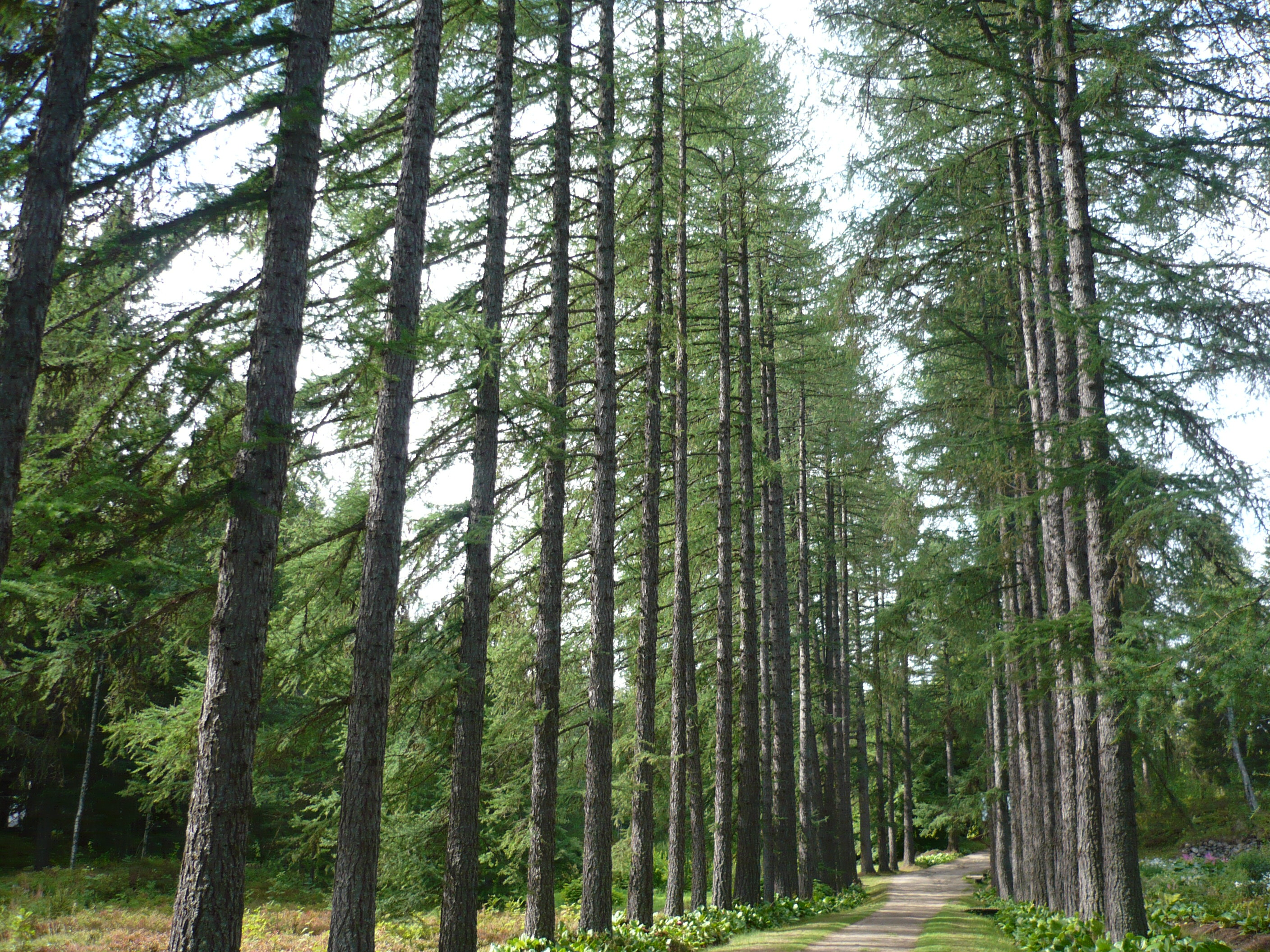 Сад ботанический (остров Большой Соловецкий, северо-западная часть, 4 км от поселка)